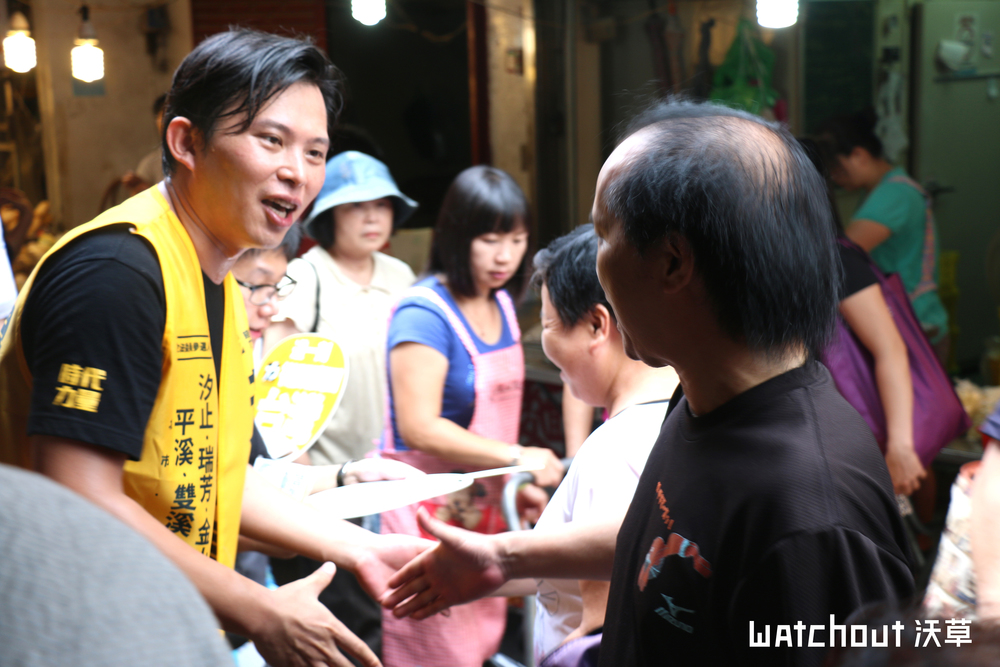 金山、萬里、汐止、平溪、瑞芳、雙溪、貢寮立委擬參選人黃國昌